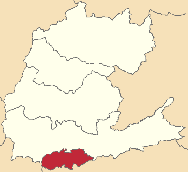 Mapa localizacor del cantón en Napo, Ecuador